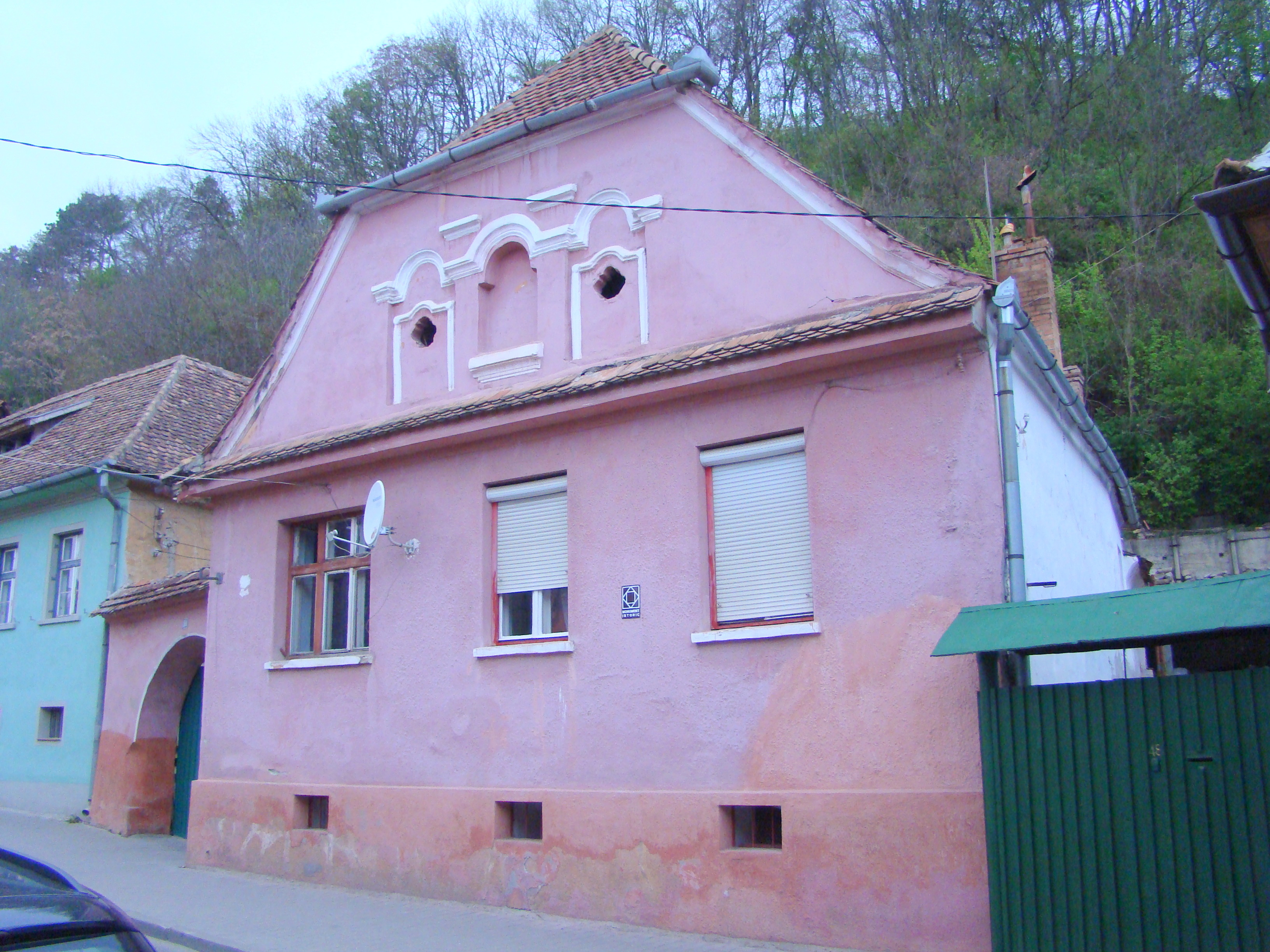 Casă, municipiul Sighișoara, str. Chendi Ilarie 50 1850 - 1900